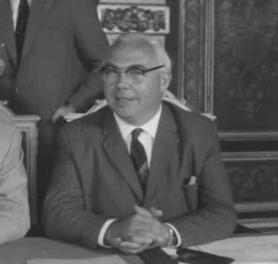 Gerard Veldkamp in 1963